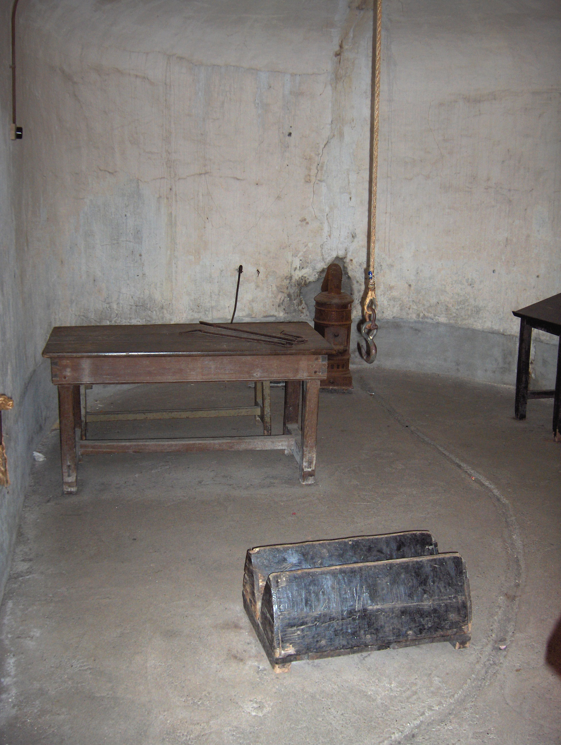 Torture room; Fort van Breendonk, Belgium